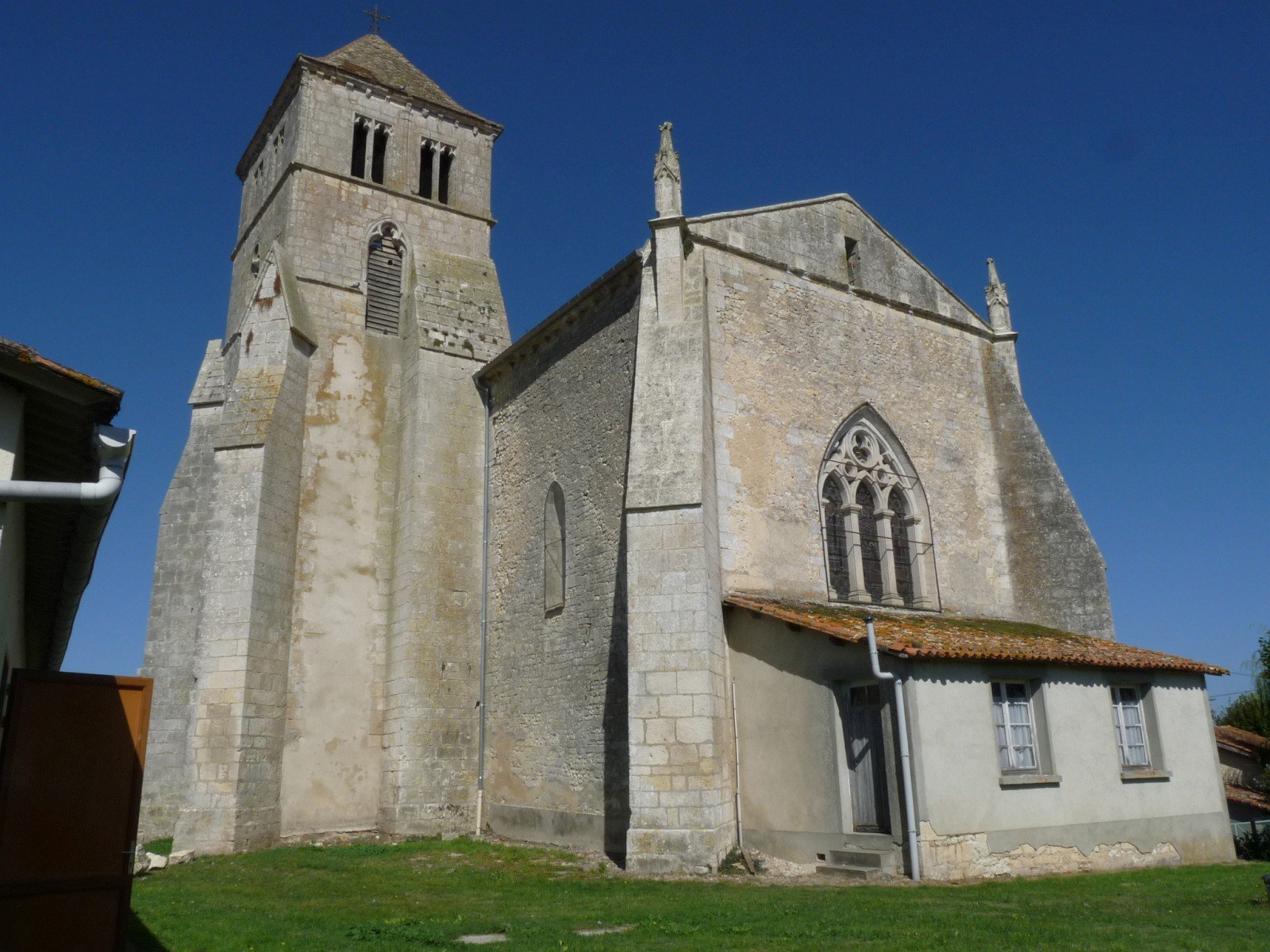 Eglise de St-Ciers-Champagne, Charente-Maritime, France